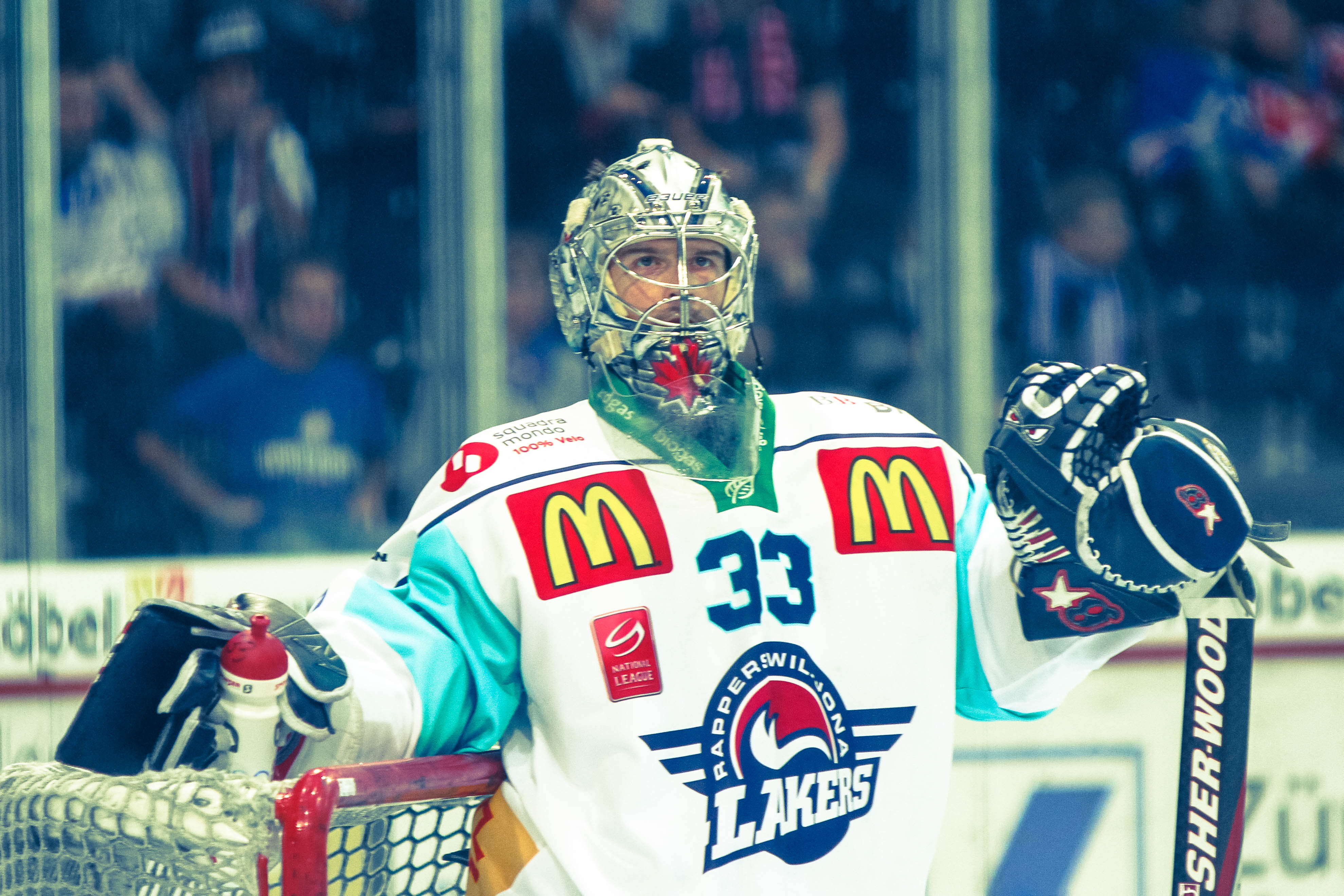 David Aebischer le 14 septembre 2012, lors d'un match entre le ZSC Lions et les Rapperswil-Jona Lakers